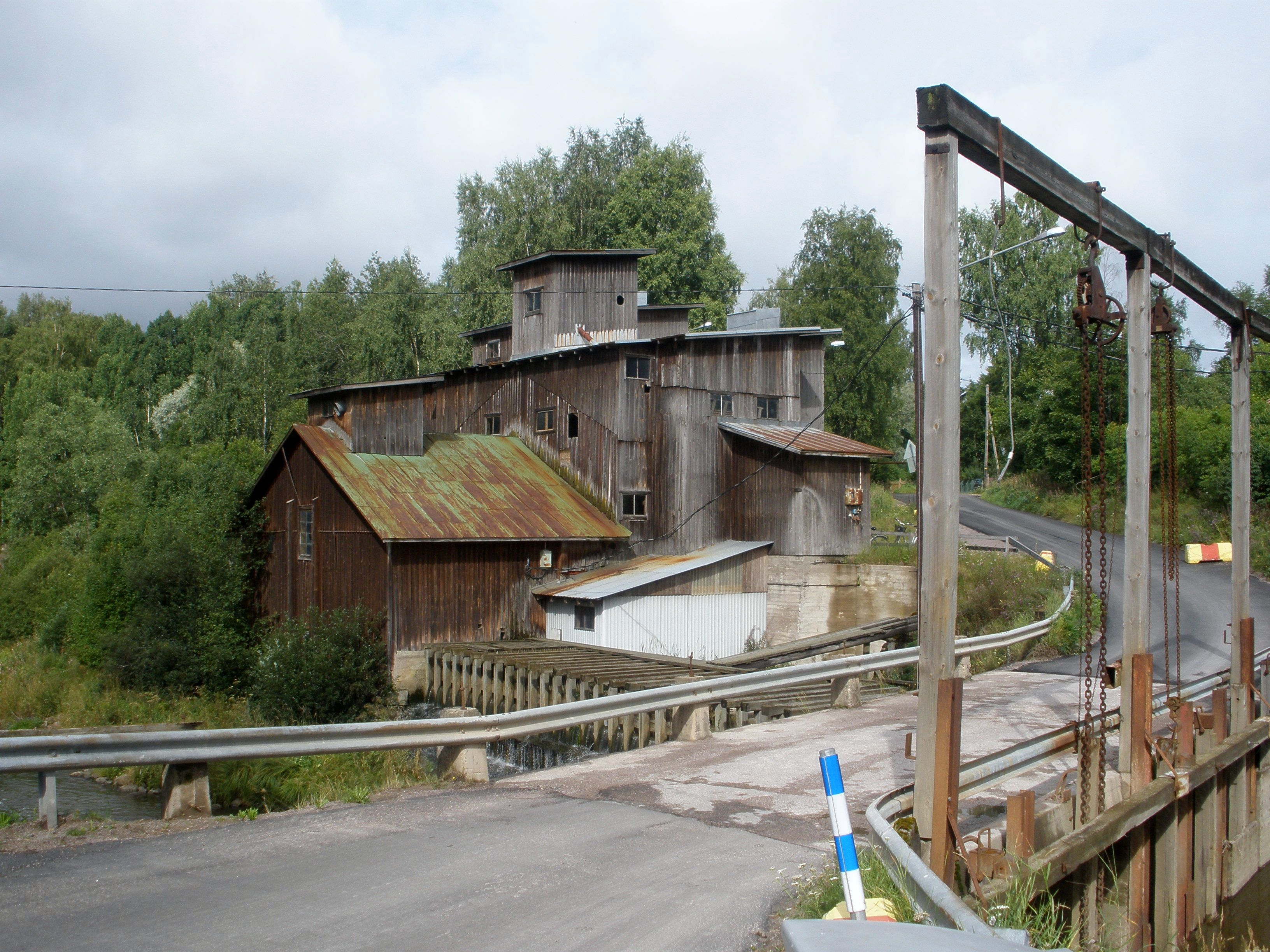 Old Mill from Haarajoki